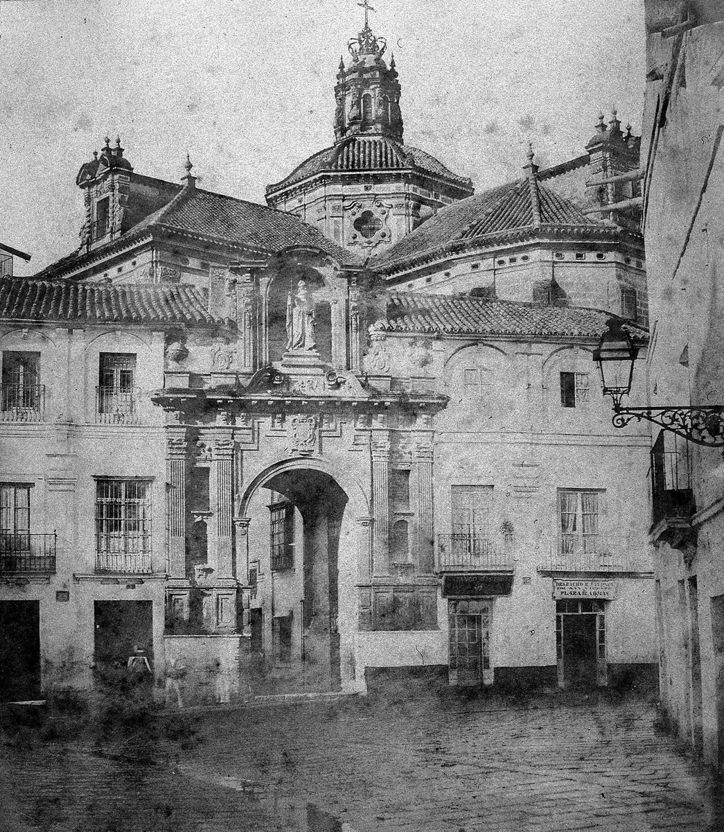 Portada del compás del antiguo convento de San Pablo. Calotipo a la cera.